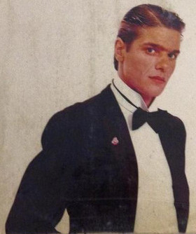 Gervasio – Gervasio